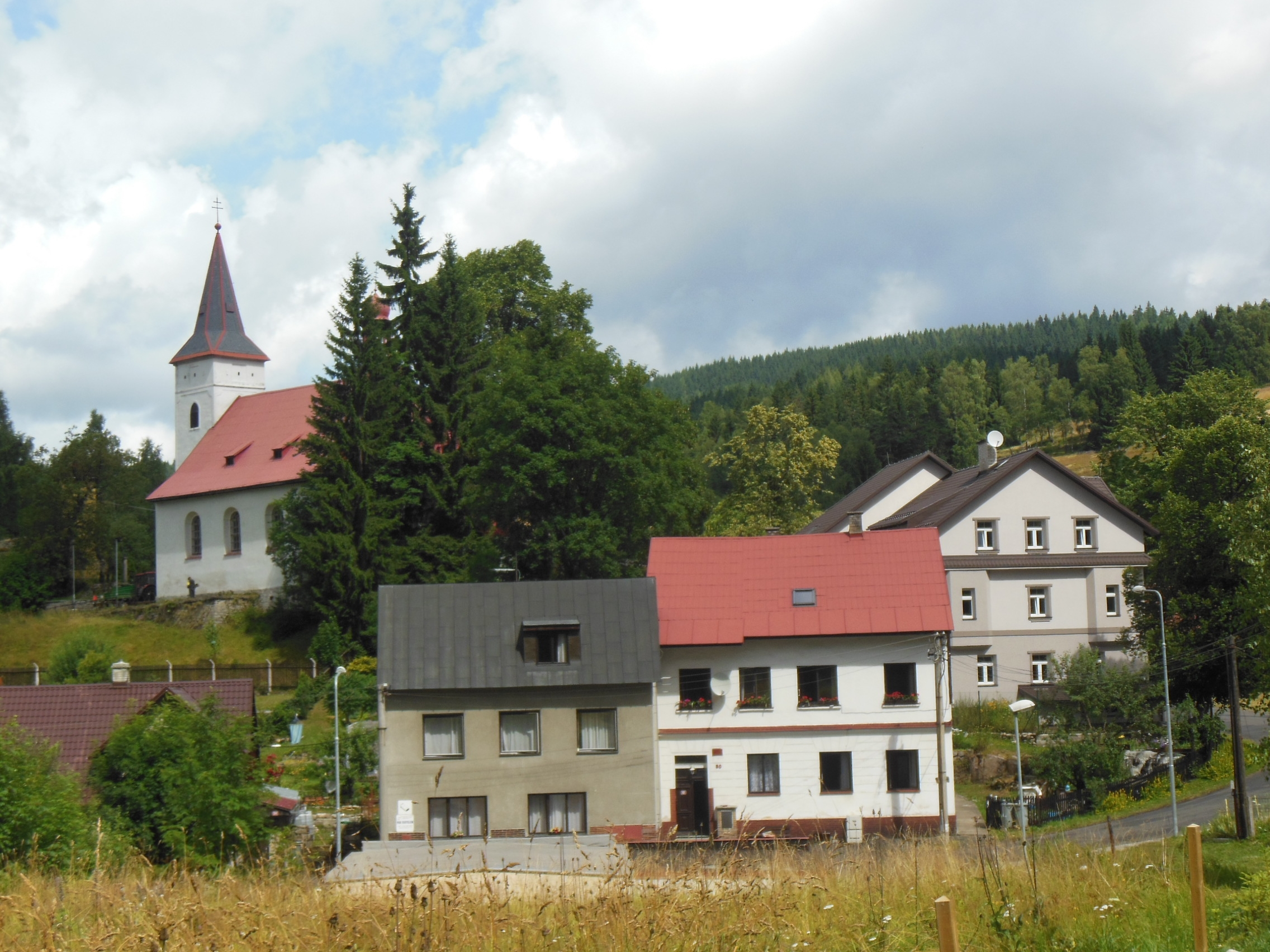 Nové Hamry (okres Karlovy Vary). Pohled z cesty vedoucí na hřbitov.